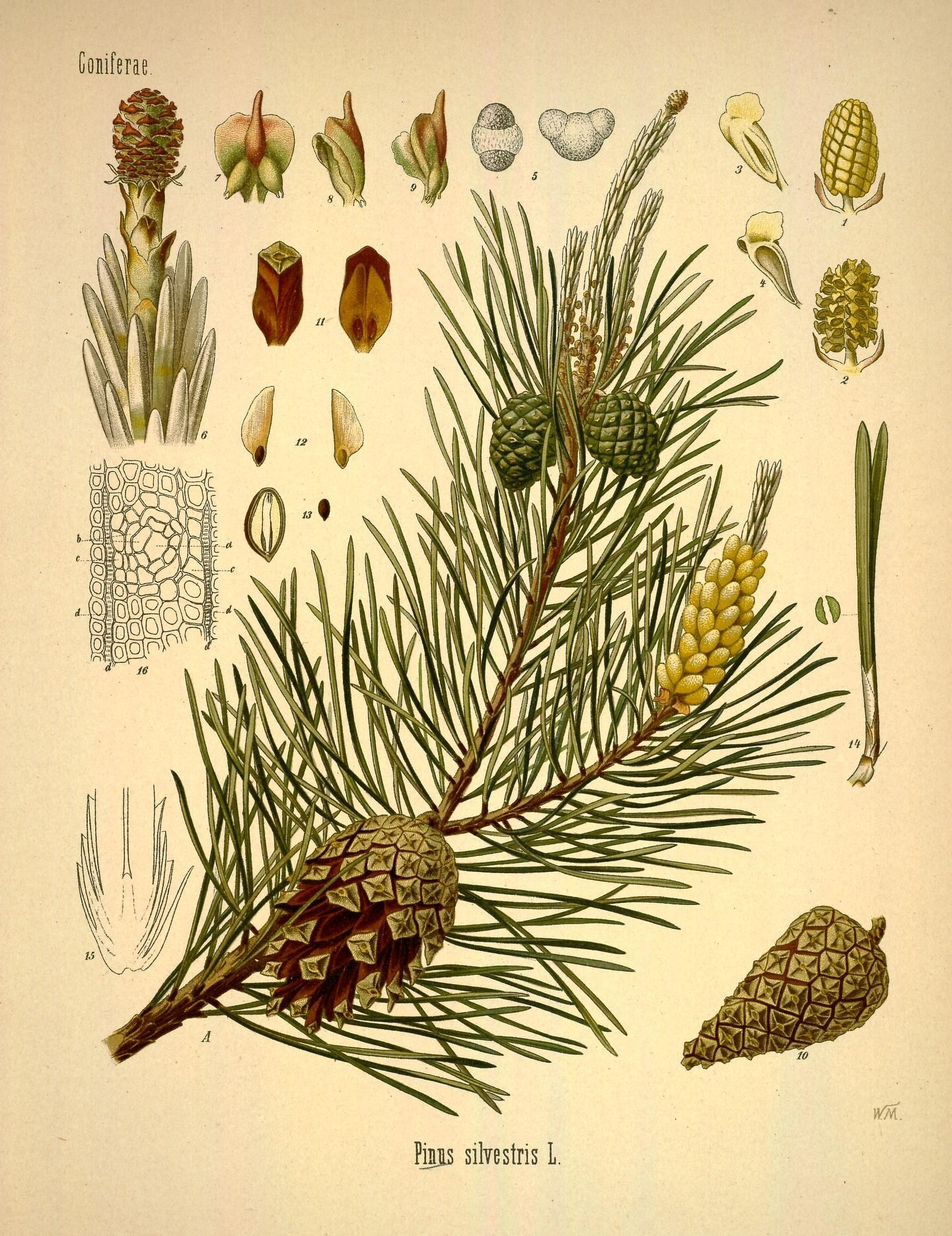 Gemeine Kiefer. A Zweig mit Blüthen und ein- und zweijährigen Früchten, natürl. Grösse; 1 u. 2 männliches Blüthenkätzchen geschlossen und geöffnet, vergrössert; 3 u. 4 männliche Blüthe, weniger und mehr geöffnet, desgl.; 5 Pollen von ver schiedenen Seiten, desgl.; 6 Zweigspitze mit weiblicher Blüthe, desgl.; 7, 8, 9 Fruchtblatt von verschiedenen Seiten, desgl.; 10 reifer, noch geschlossener Fruchtzapfen, natürl. Grösse; 11 reifes Fruchtblatt mit Samen, von verschiedenen Seiten, desgl.; 12 Samenflügel mit und ohne Samen, desgl.; 13 Same in natürl. Grösse und im vergrösserten Längsschnitt; 14 Nadelpaar mit Querschnitt, vergrössert; 15 Grund des Nadelpaares im Längsschnitt, desgl.; 16 Holzquerschnitt mit dem Harzgange a, dem umgebenden Holzparenchym b, Holzfasern c und den Markrindenstrahlen d, (nach Dippel).